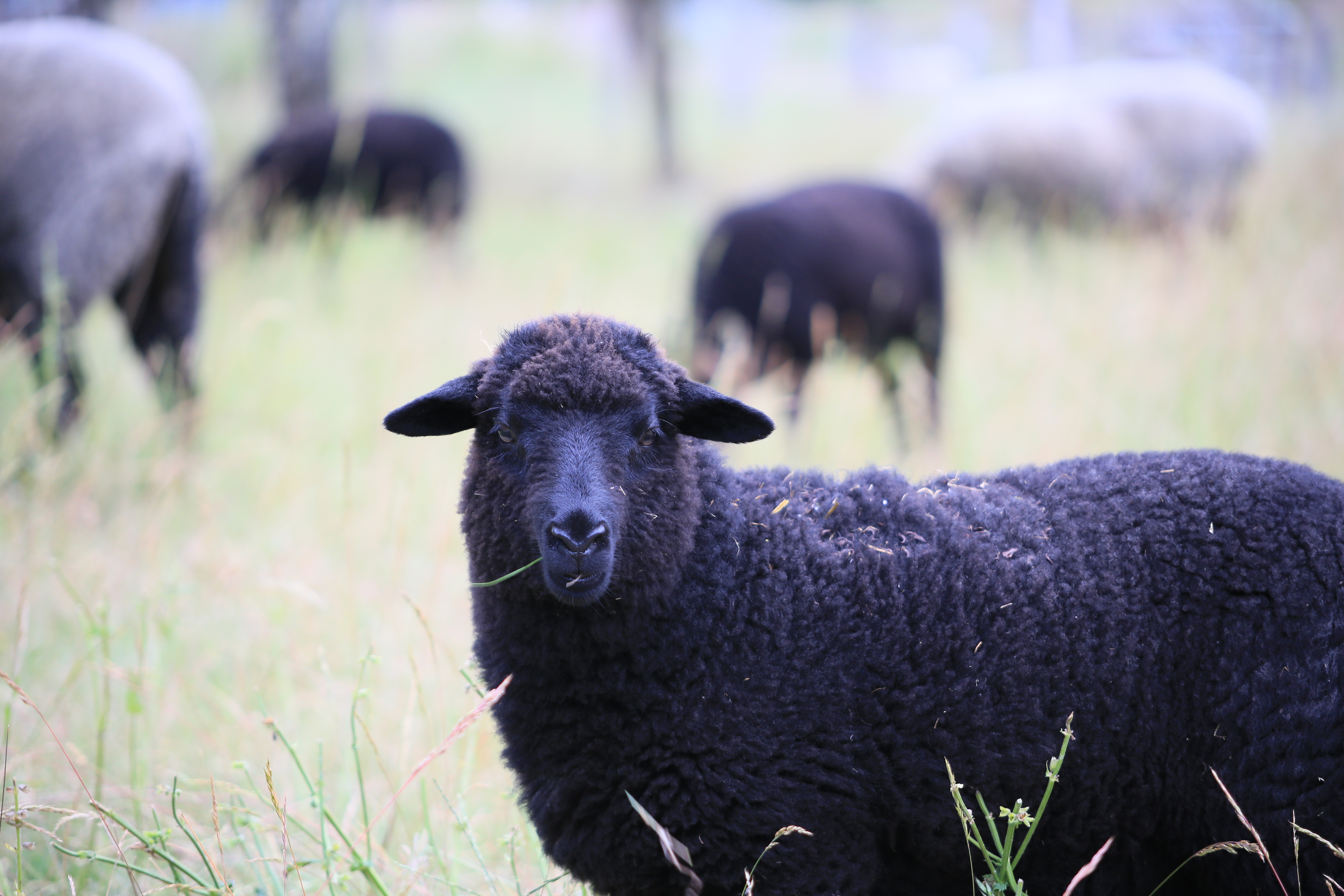 Schafsherde im Landschaftspark Herzberge